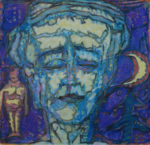 Hans Tyderle: Self-Portrait